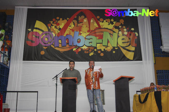 Foto: Mauro Samagaio